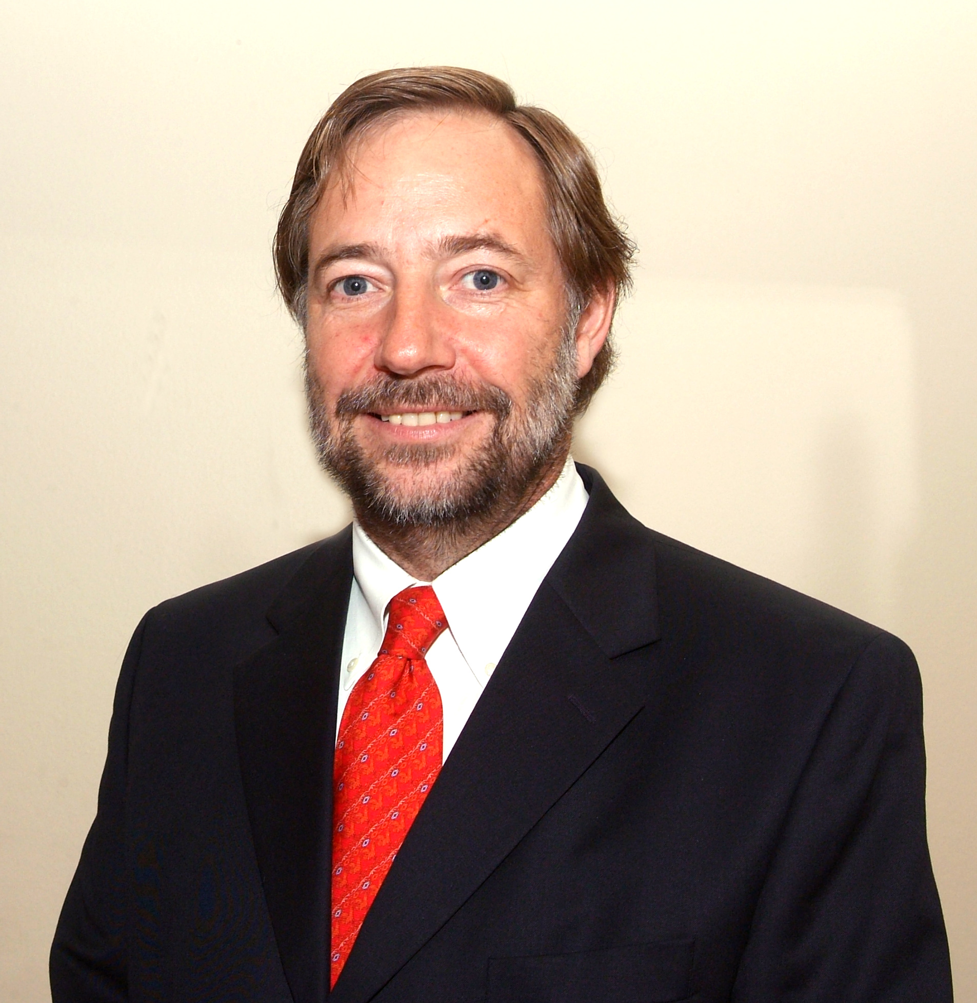 Fotografía del Ministro de Transportes y Telecomunicaciones Pedro Pablo Errázuriz Domínguez.